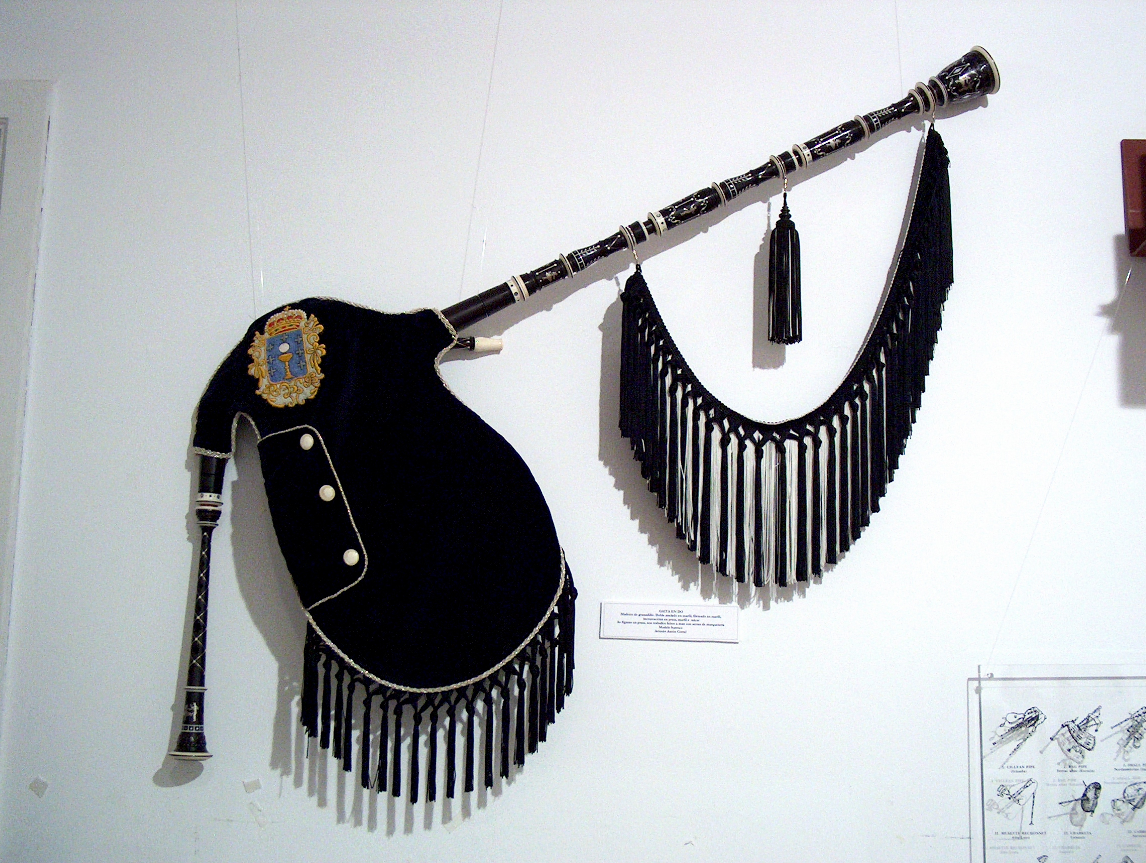 Gaita feita polo artesán Antón Corral.